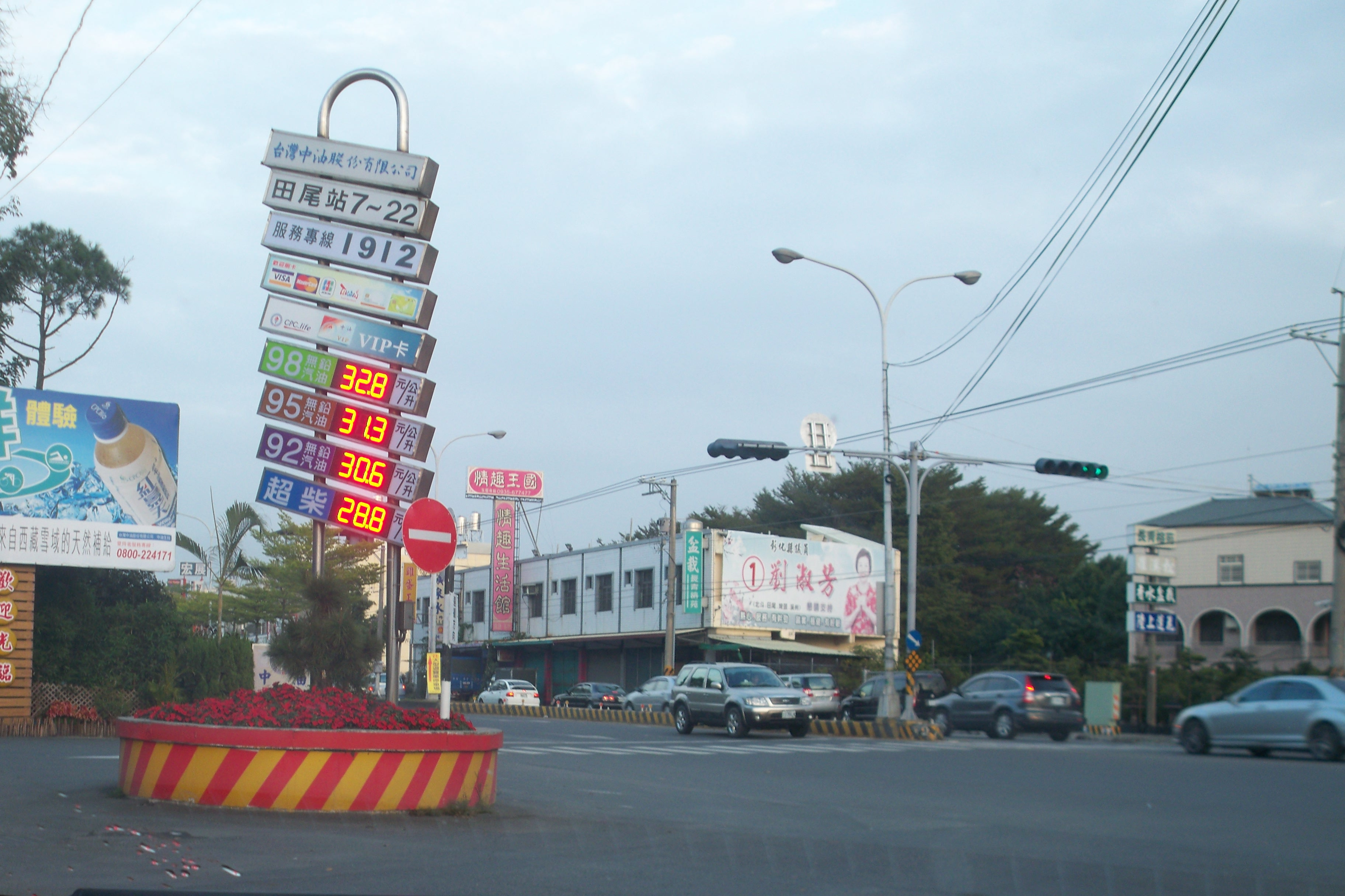 中文（台灣）: 彰化縣田尾鄉，台灣中油田尾站油價招牌。